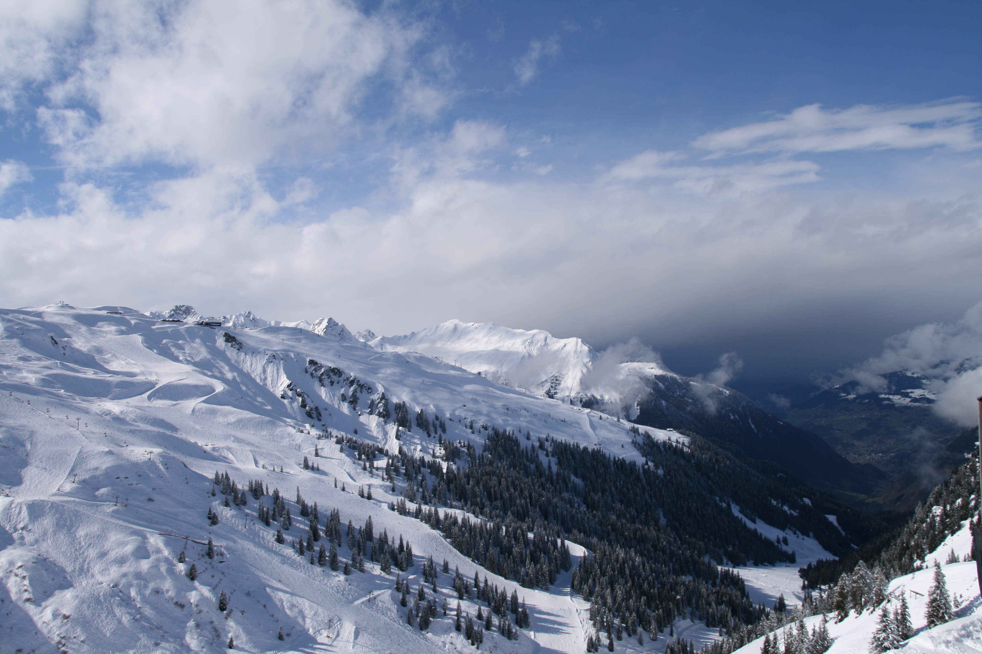 Blick von der Nova Stoba im Montafoner Skigebiet Silvretta ins Montafoner Tal in Vorarlberg.